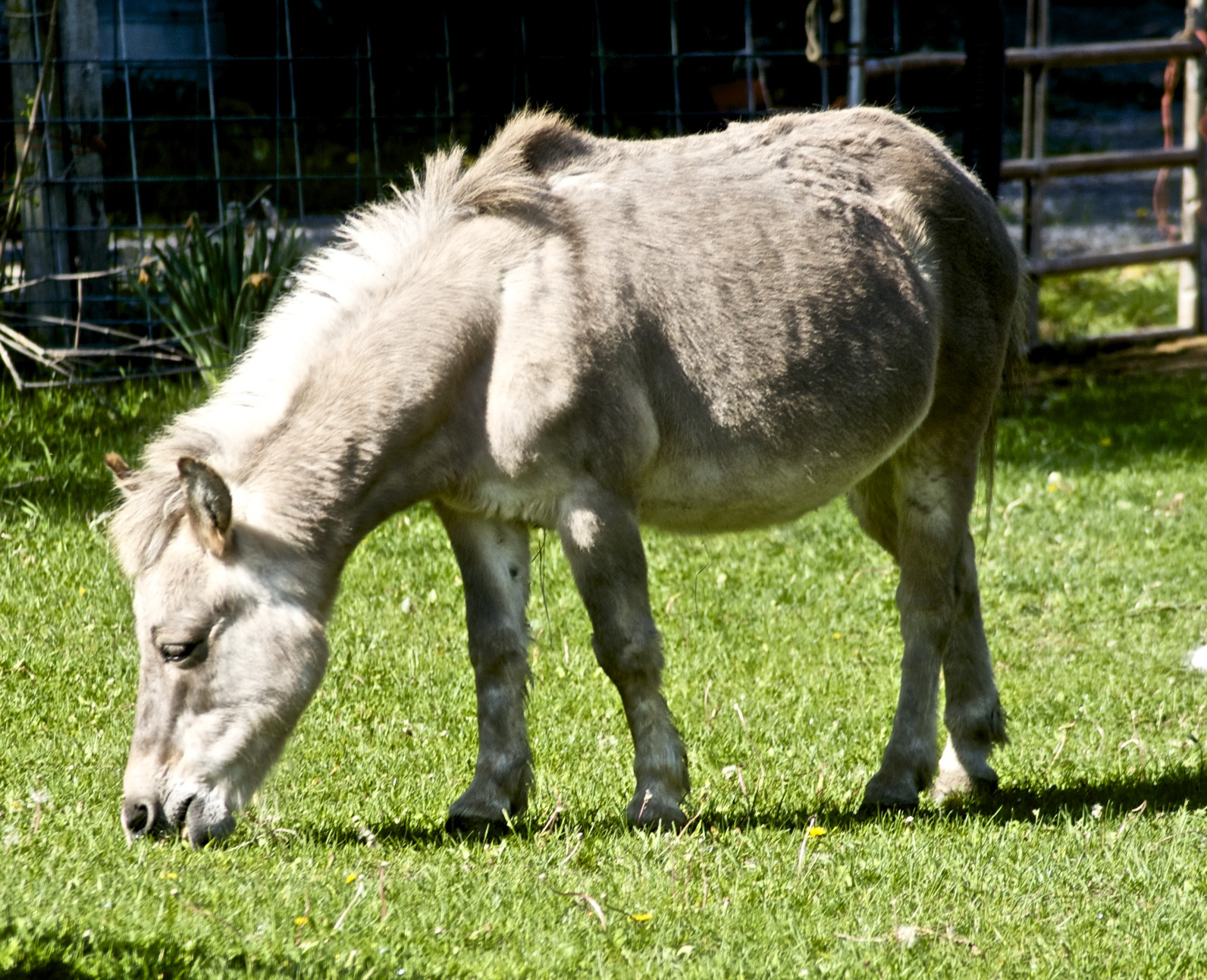 Hinny